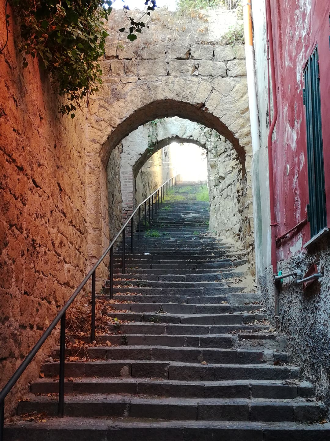 Scale nei pressi di una traversa con cancello in via Tasso, Napoli.